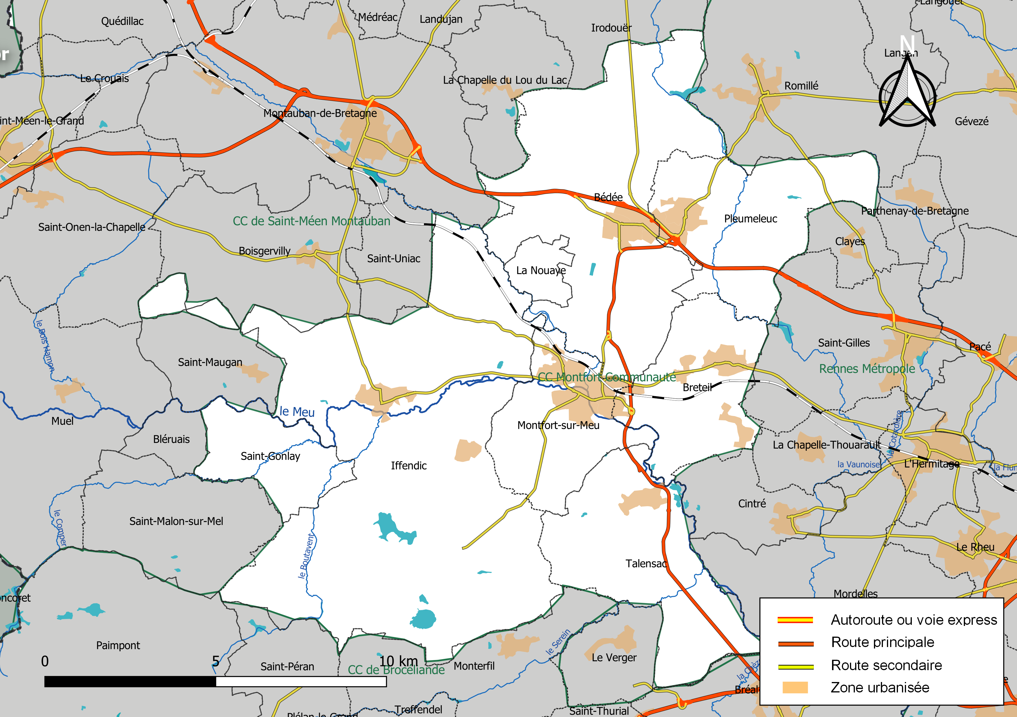 Carte géographique de l'intercommunalité Montfort Communauté, département d'Ille-et-Vilaine, France. Composition au 1er janvier 2019.